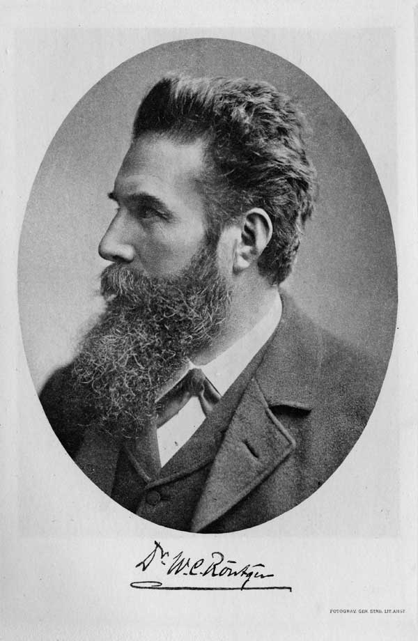 Wilhelm Conrad Röntgen, Discoverer of X-Rays in 1895.